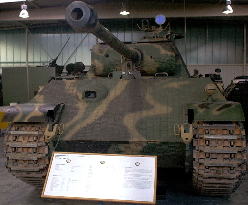 Beschreibung: Panzerkampfwagen V Panther (Ausführung G / Sd.Kfz. 171) der derzeit besterhaltene Panther (fahrbereit) von 1985 - 1991 restauriert. Zusätzlich aufgebracht nachgebildete Antihaftminen - ("Zimmerit-") Beschichtung. aktives Infrarot-Kommandanten-Fahr/ Zielgerät FG 1250 installiert (Nachbildung) ausgestellt in der Wehrtechnischen Studiensammlung Koblenz Fotograf: Stahlkocher (Bearbeitung: Darkone)